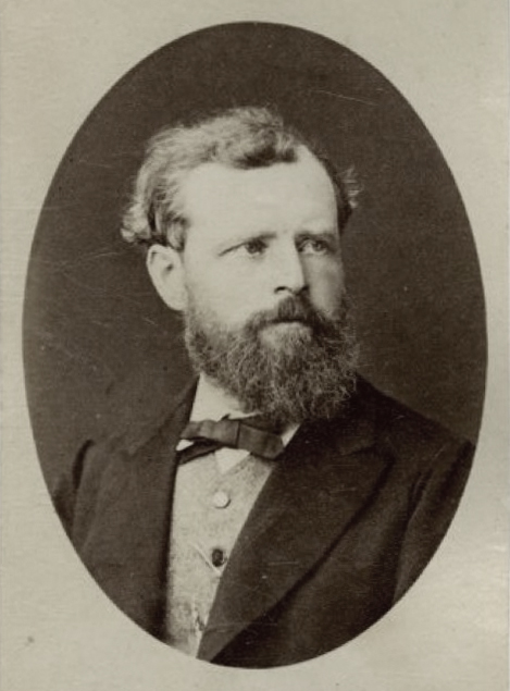 Isidore Bonheur